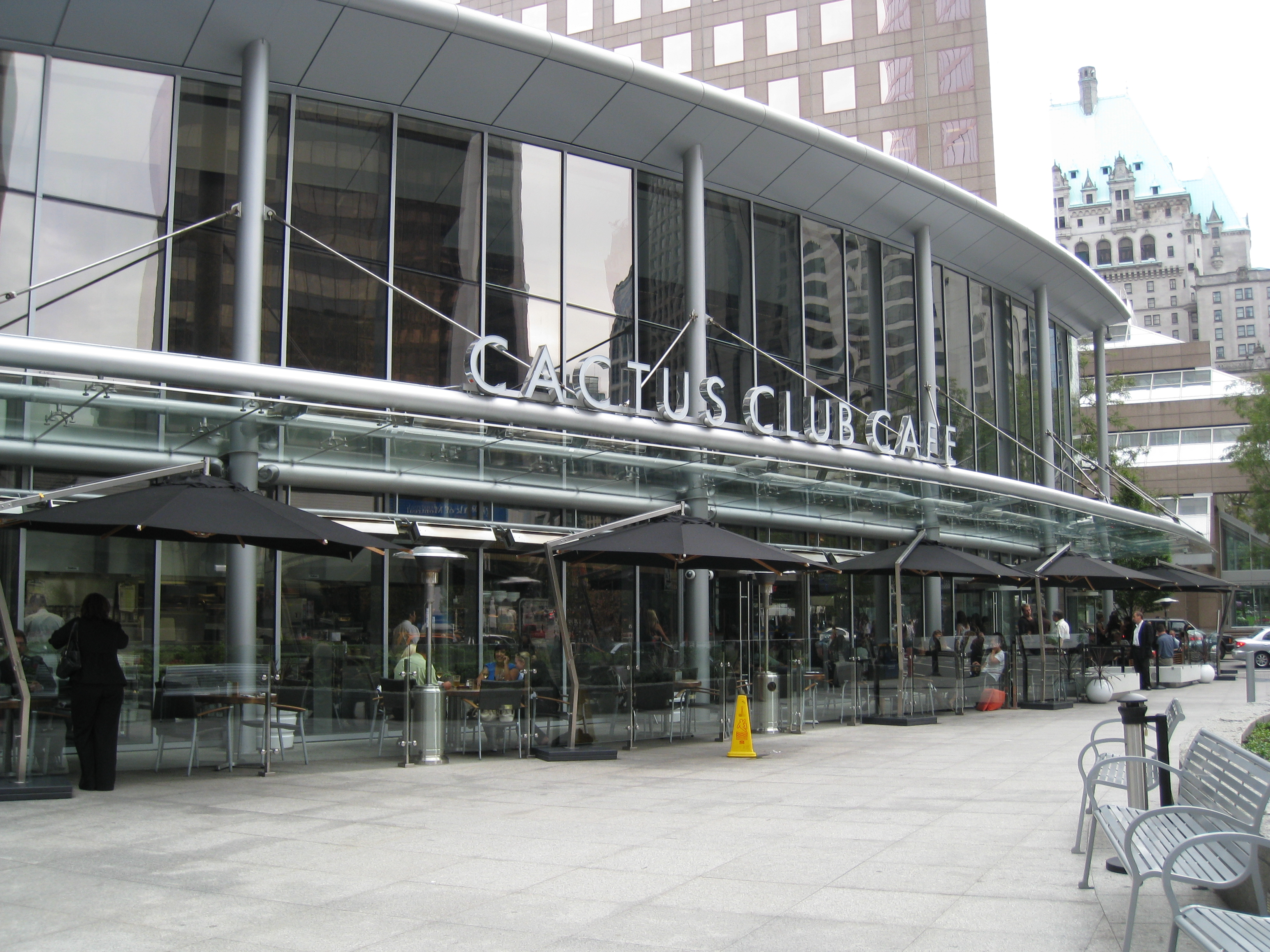 Cactus Club Cafe